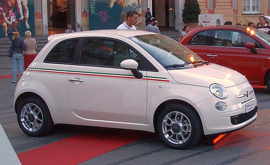 la nuova 500 Fiat viene presentata a Genova